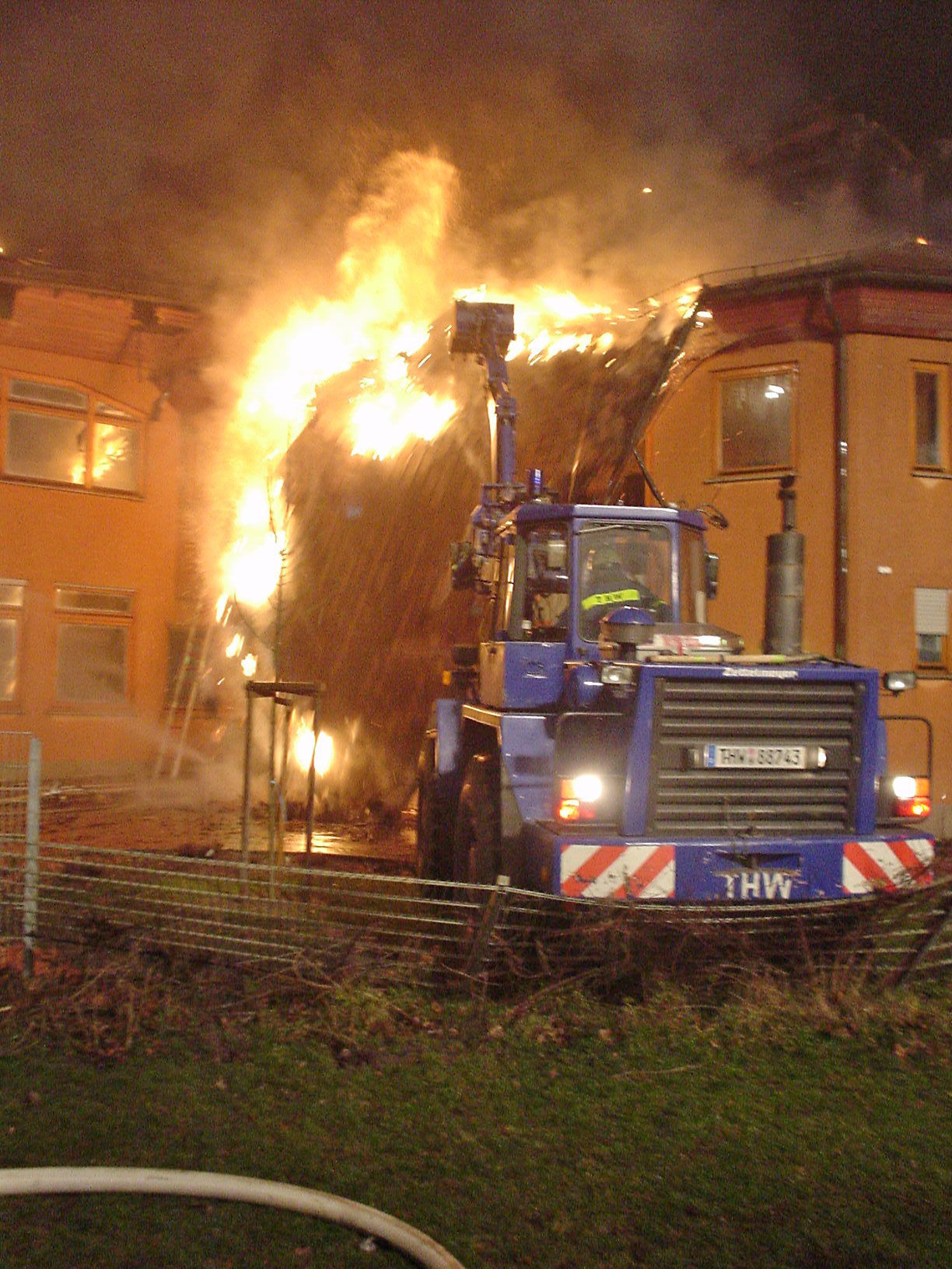 Im Rahmen der Amtshilfe für die Feuerwehr reißt ein Radlader des THW (BRMG = Bergungsräumgerät) die Dachhaut einer brennenden Schulaula in Bonn auf. Bericht des betreffenden Einsatzes (Archivlink)